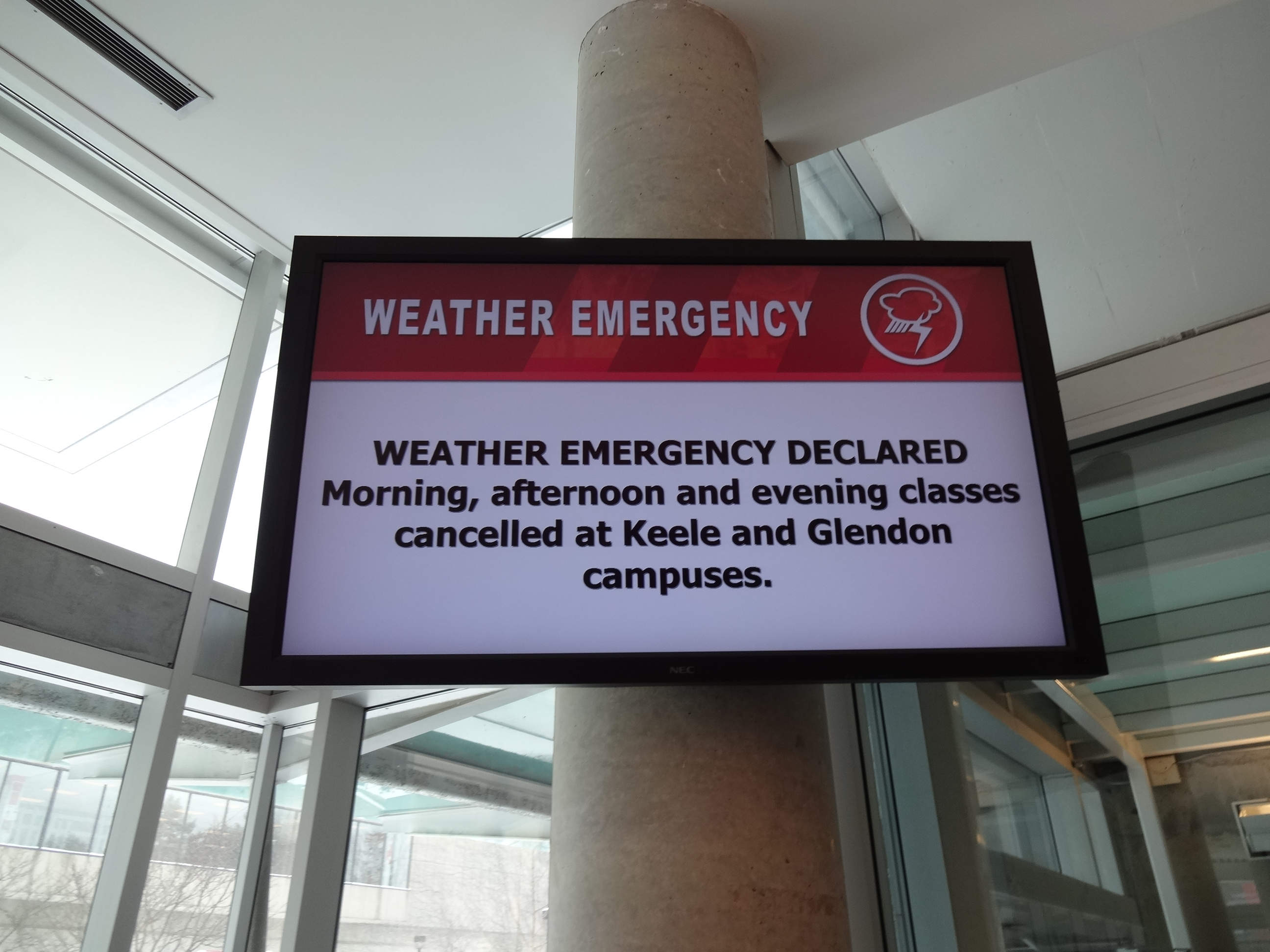 Televisão a noticiar a Tempestade do Cabo Hatteras dentro da York University.